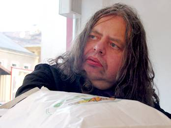 Hermes Phettberg in der Galerie Blumberg (Wien) am 24. 5. 2003